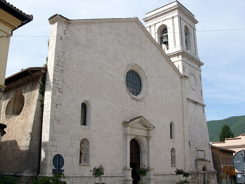 Norcia - Cattedrale